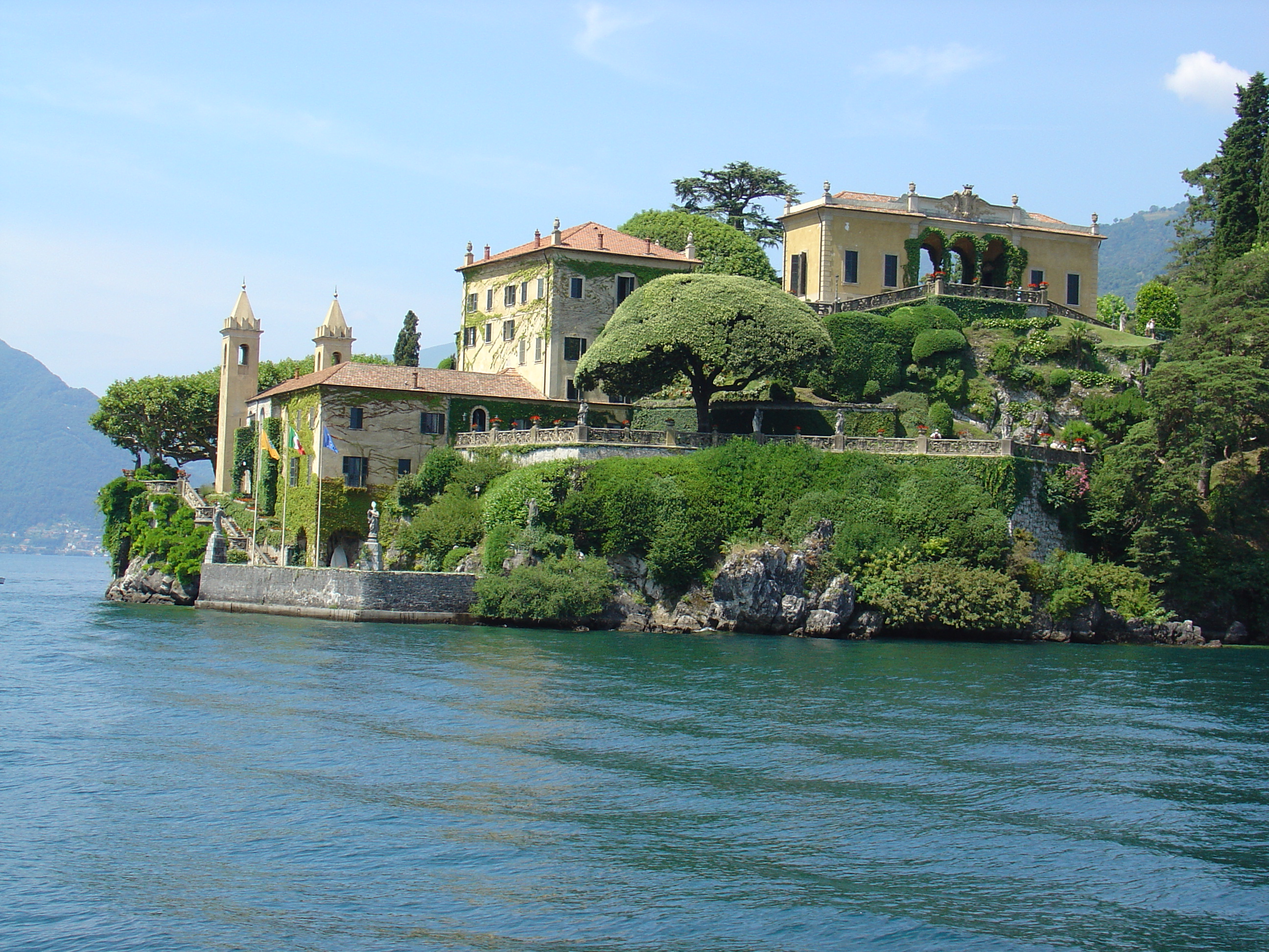 Villa Balbianello vue du lac de Côme - Commune de Lenno Source : image réalisée par VARNA juillet 2006